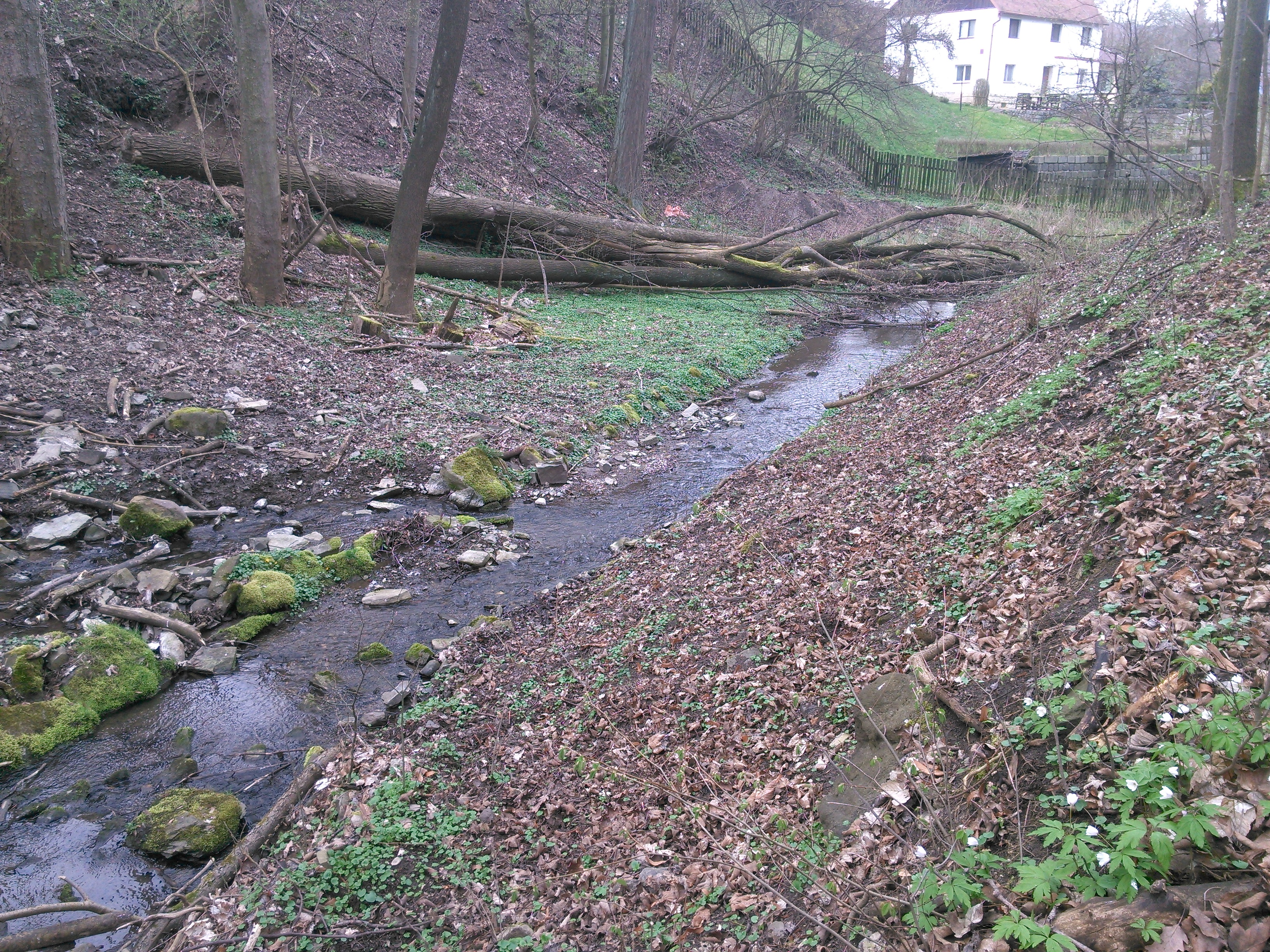 Potok.